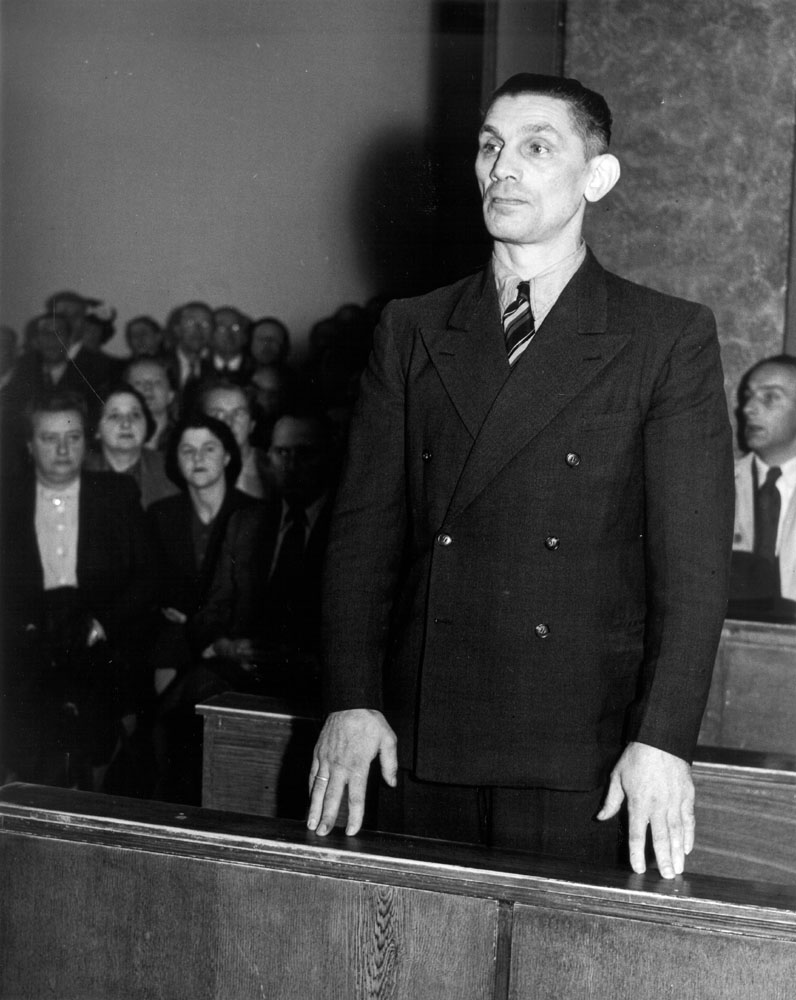 Sam Olij voor het Bijzonder Gerechtshof in het gebouw van de Nederlandse Handelmaatschappij aan de Vijzelstraat, Amsterdam, 3 oktober 1947 Foto Ben van Meerendonk / AHF, collectie IISG, Amsterdam